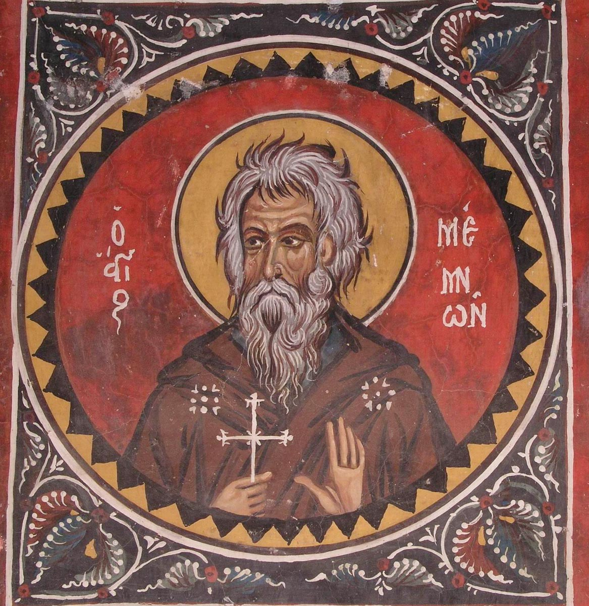 Мемнон Чудотворец, Египетский. Фреска. Панагия Асину. Никитари. Кипр. XII век.